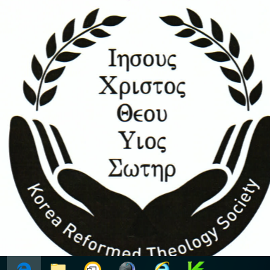 한국개혁신학회